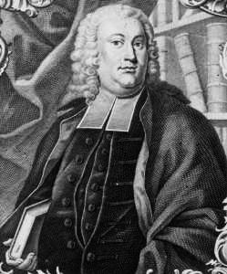 Dr. German (Hermann) August Ellrodt, Minister des Markgrafentums Bayreuth, ev. Theologe und Religionslehrer der Prinzessin von Bayreuth, Schriftsteller (* 22. September 1709; + 7. Juli 1760)